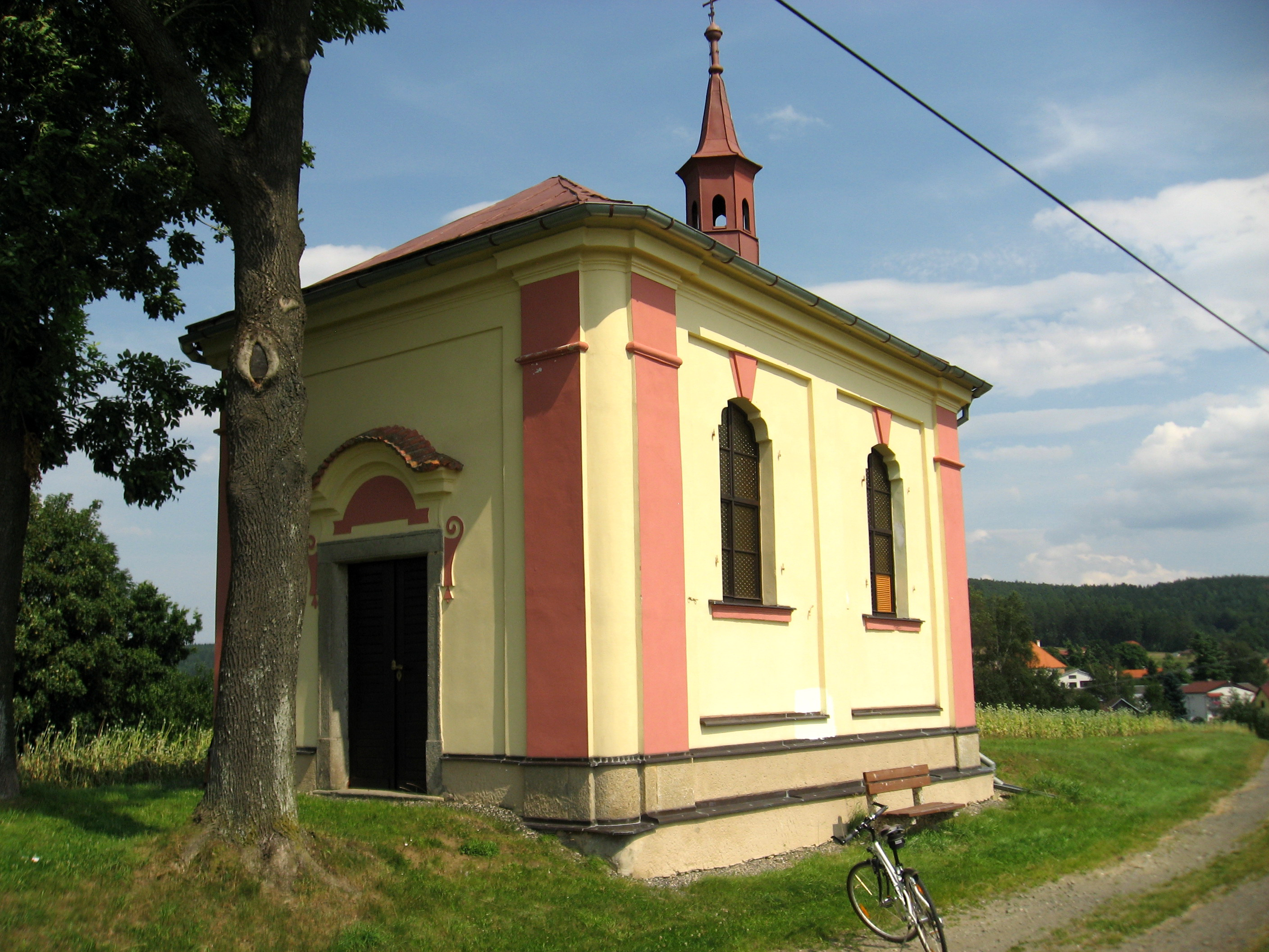 Vilémovice, kaple